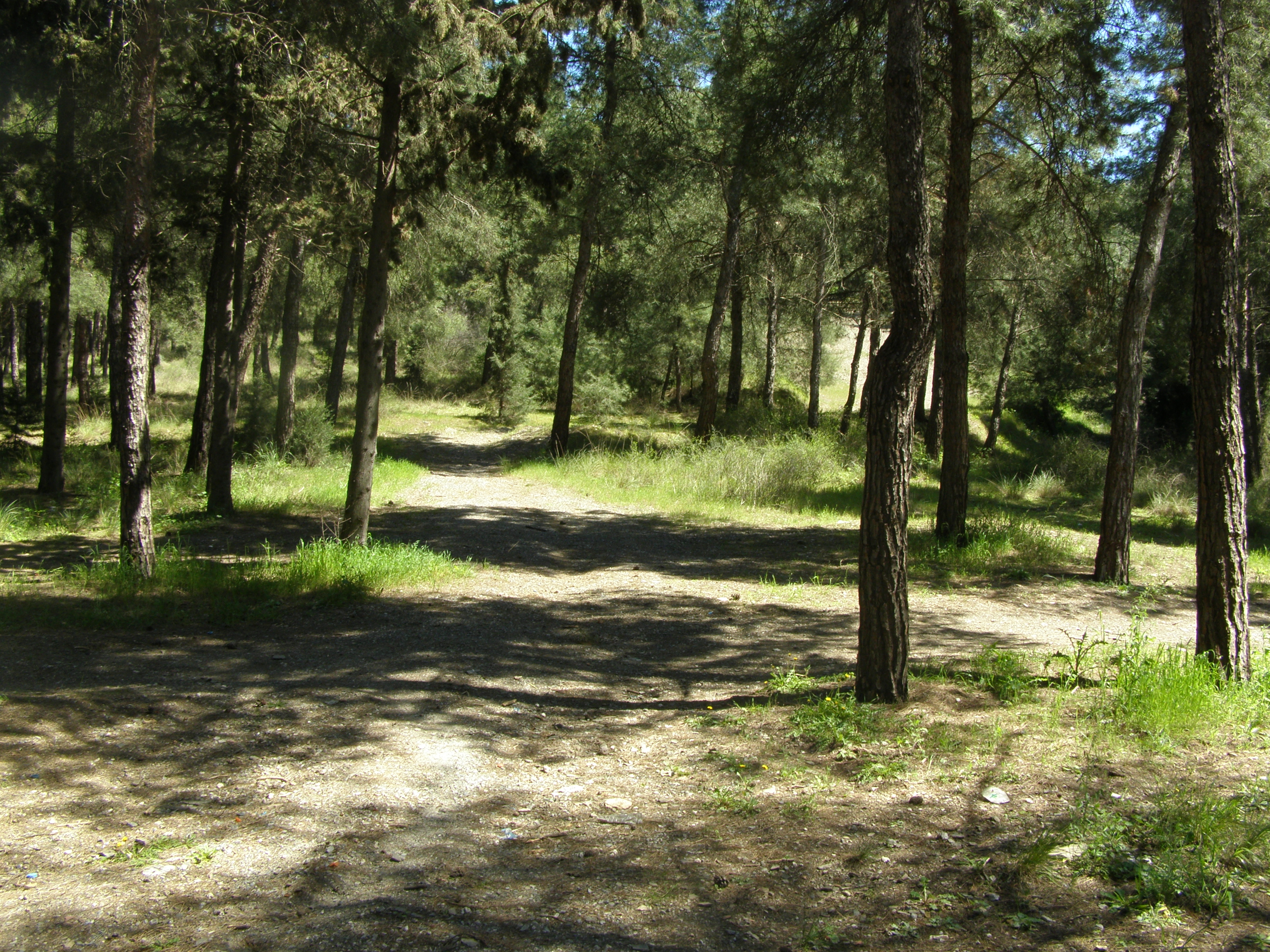 Το δάσος του Σέιχ Σου στην Θεσσαλονίκη